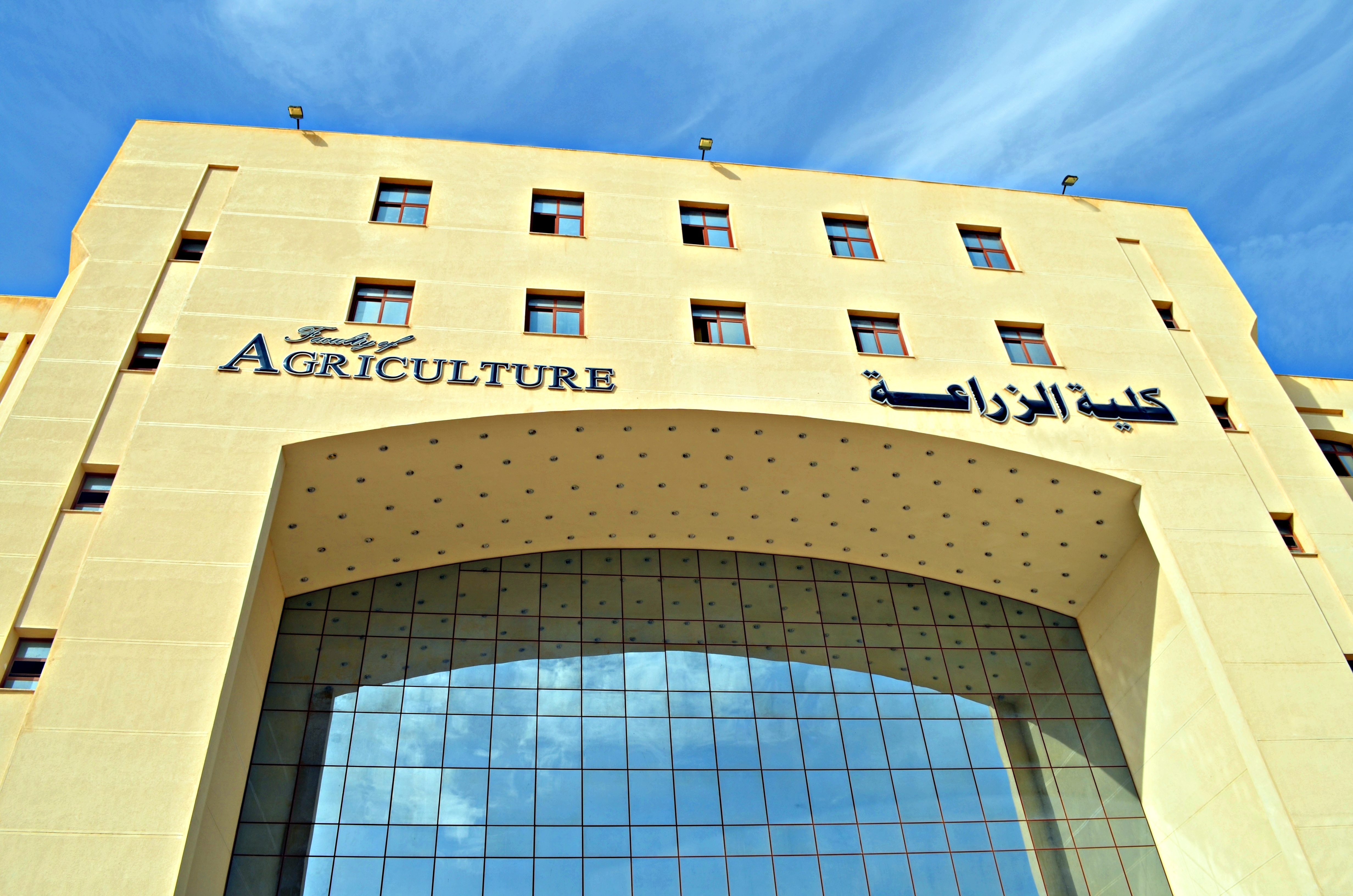 كلية الزراعة، جامعة كفر الشيخ، مدينة كفر الشيخ، مصر